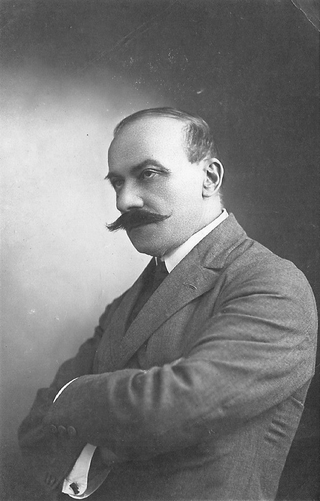 Luigi Trinchero